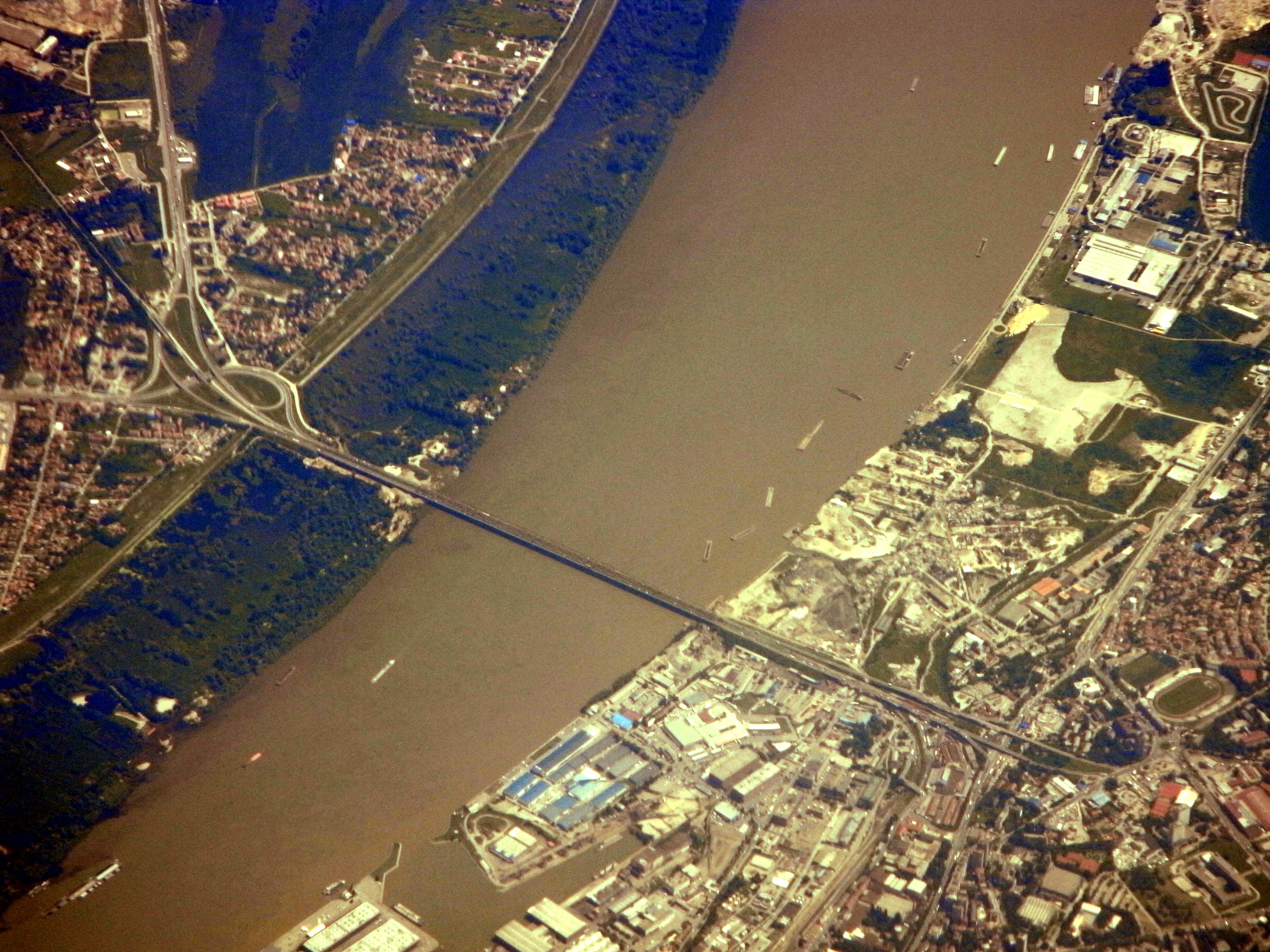 Die Pantschewo-Brücke über die Donau in Belgrad.